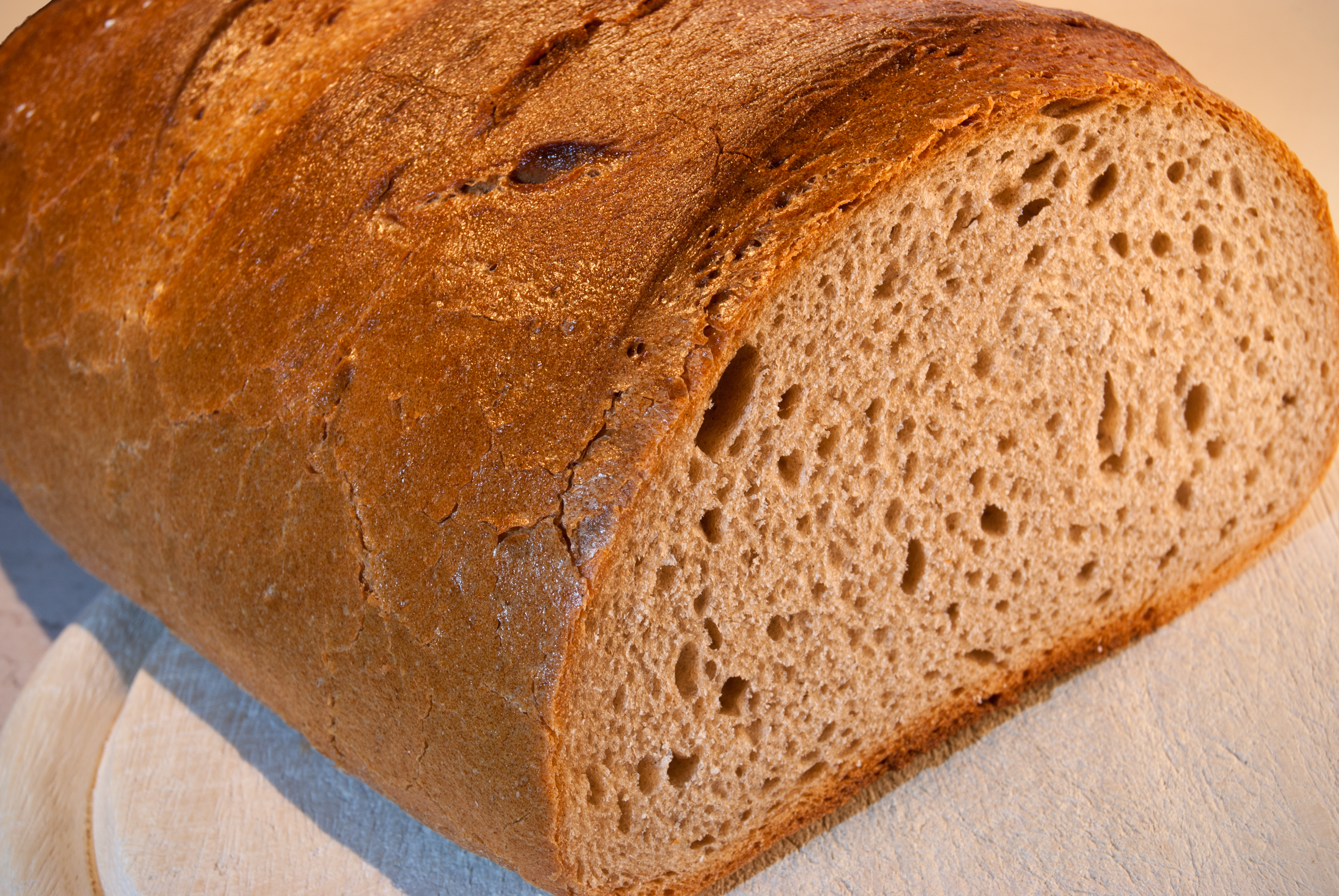 angeschnittenes Kasseler Brot